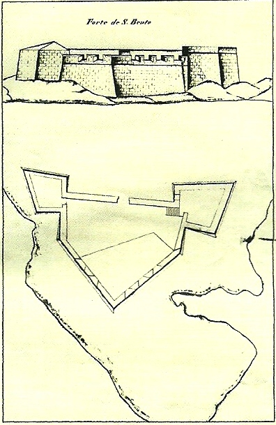 Forte de São Bento, s/d, autor desconhecido, Arquivo Histórico Militar, Lisboa. in MARTINS, José Salgado, "Património Edificado da Ilha Terceira: o Passado e o Presente". Separata da "Atlântida", vol. LII, 2007. p. 43.